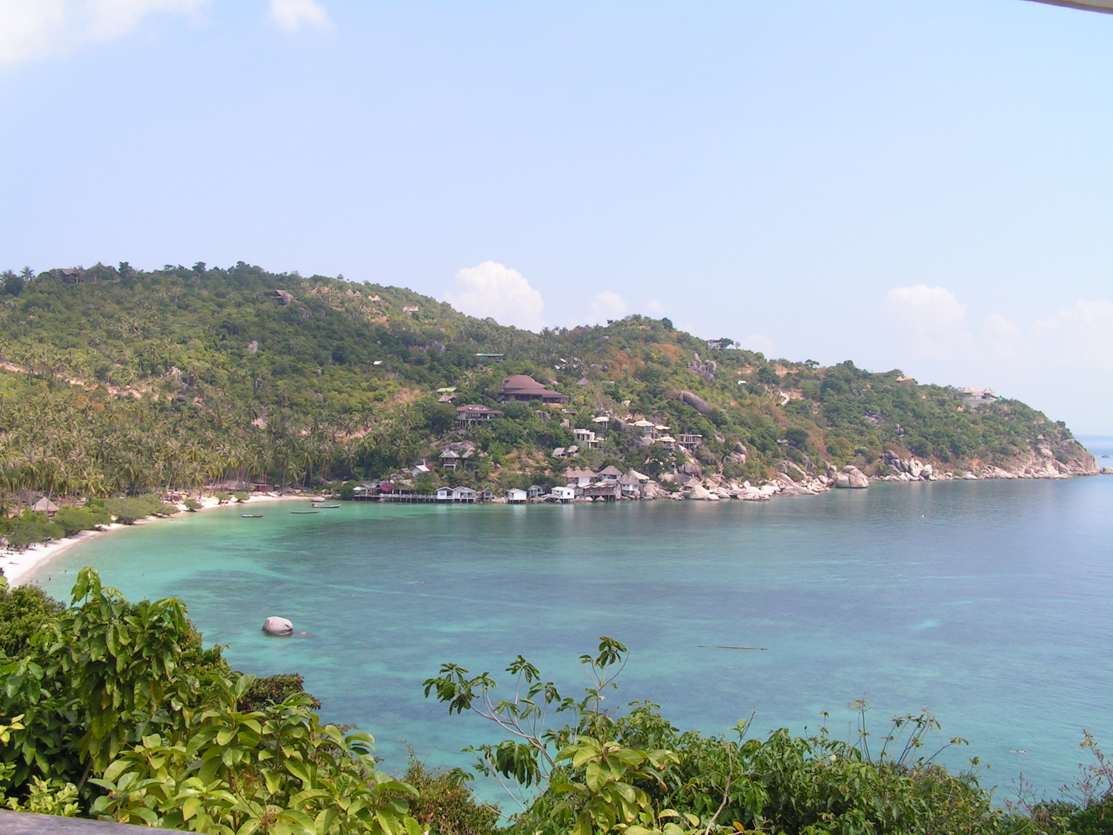 Ko Tao bay